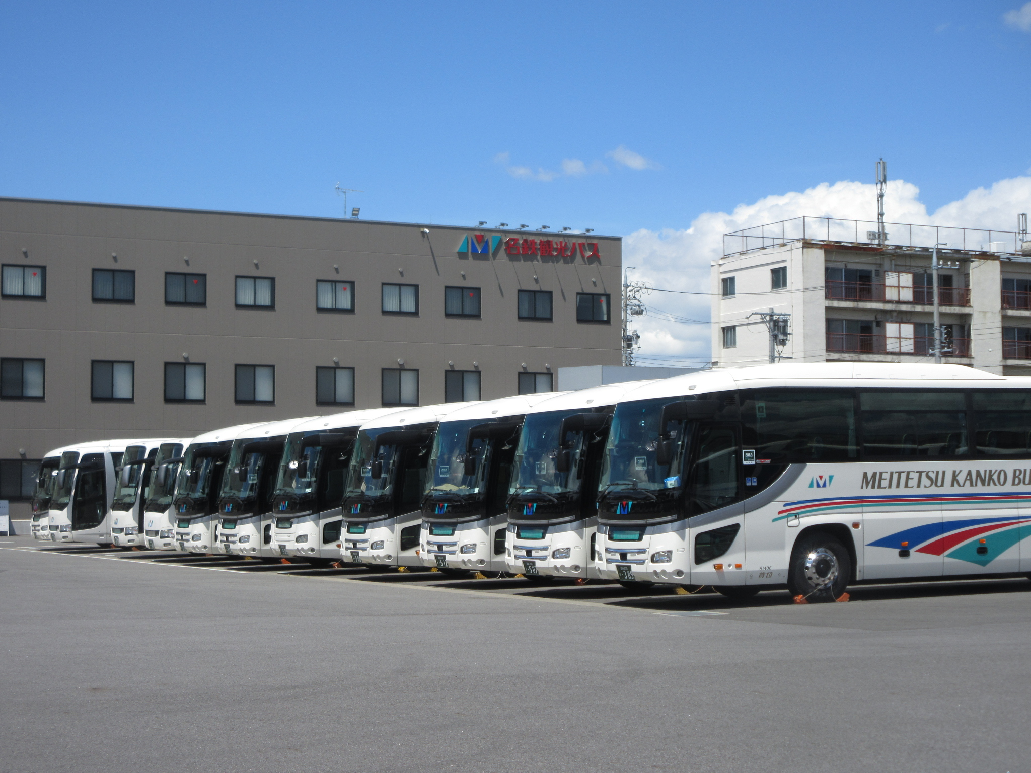 名鉄観光バス岡崎営業所（岡崎市大西町）